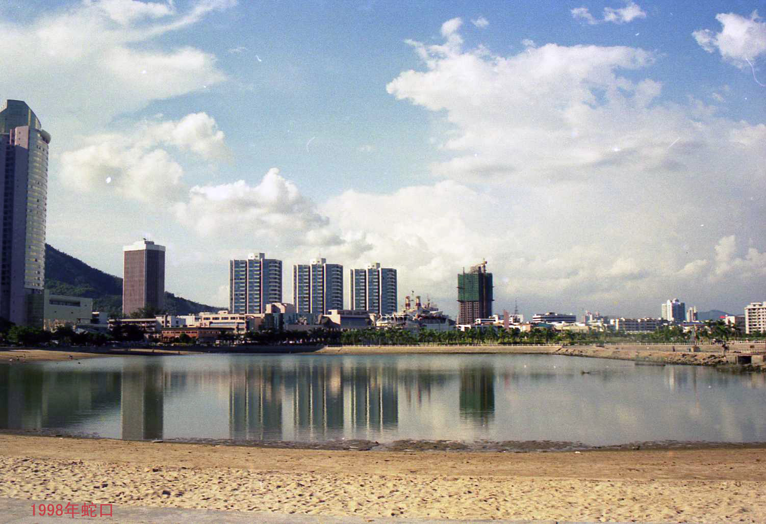 1998年 蛇口 Shekou 1998